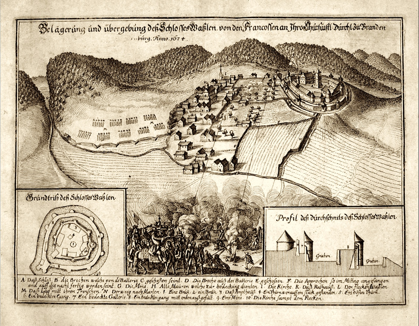 Carte ancienne du Château de Wasselonne en 1674, France, Bas-Rhin. Cuivre gravé en 1682 par Matthias Mérian.